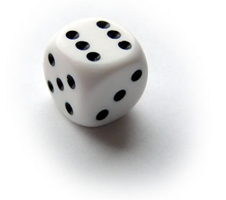 urm ... yeah!